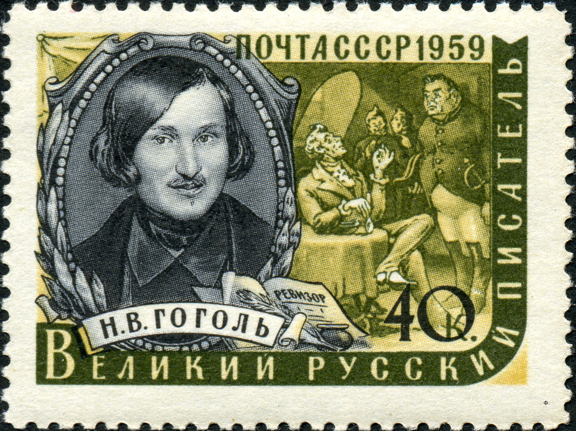 Марка СССР